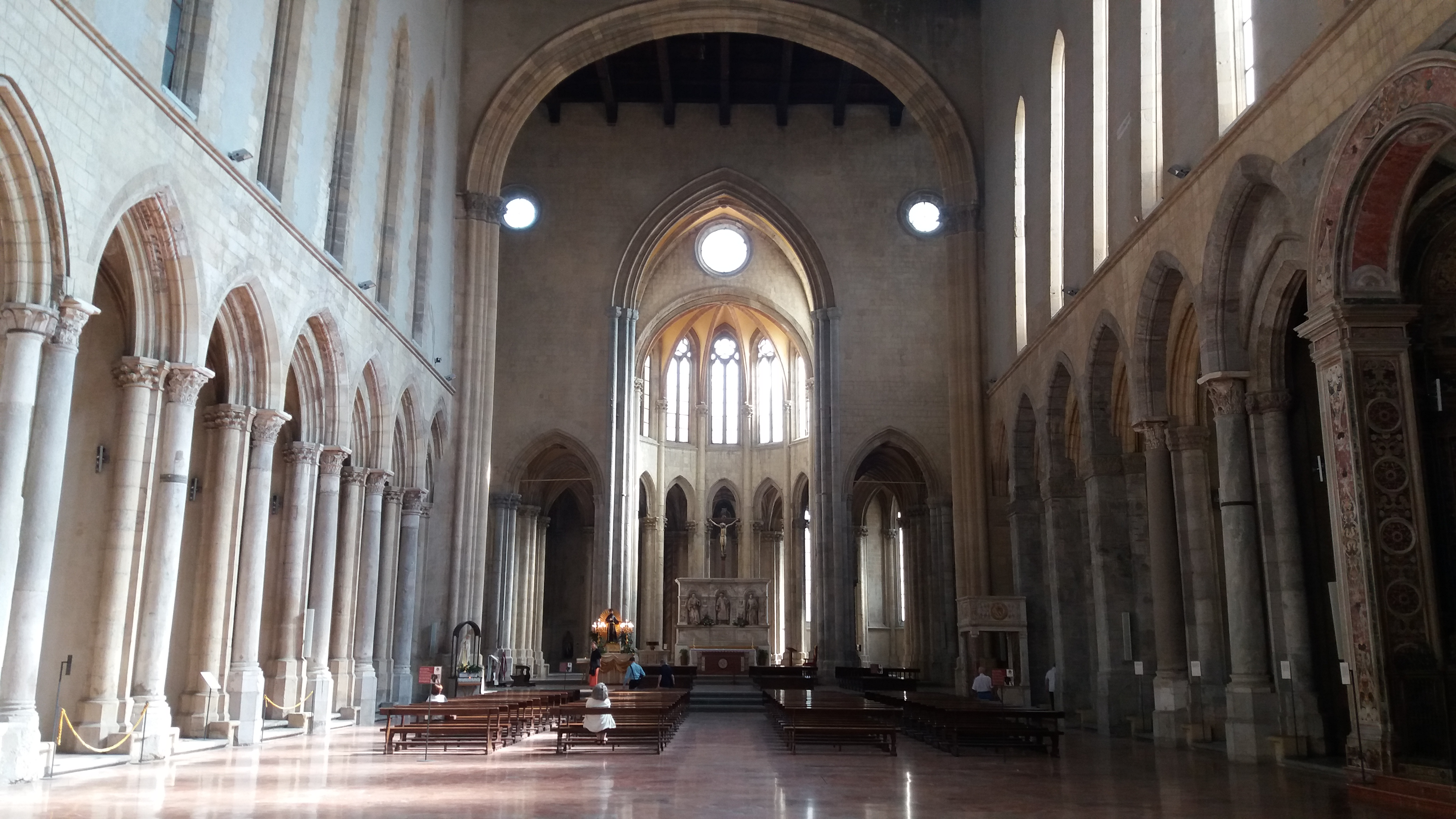 Interno della basilica di San Lorenzo Maggiore